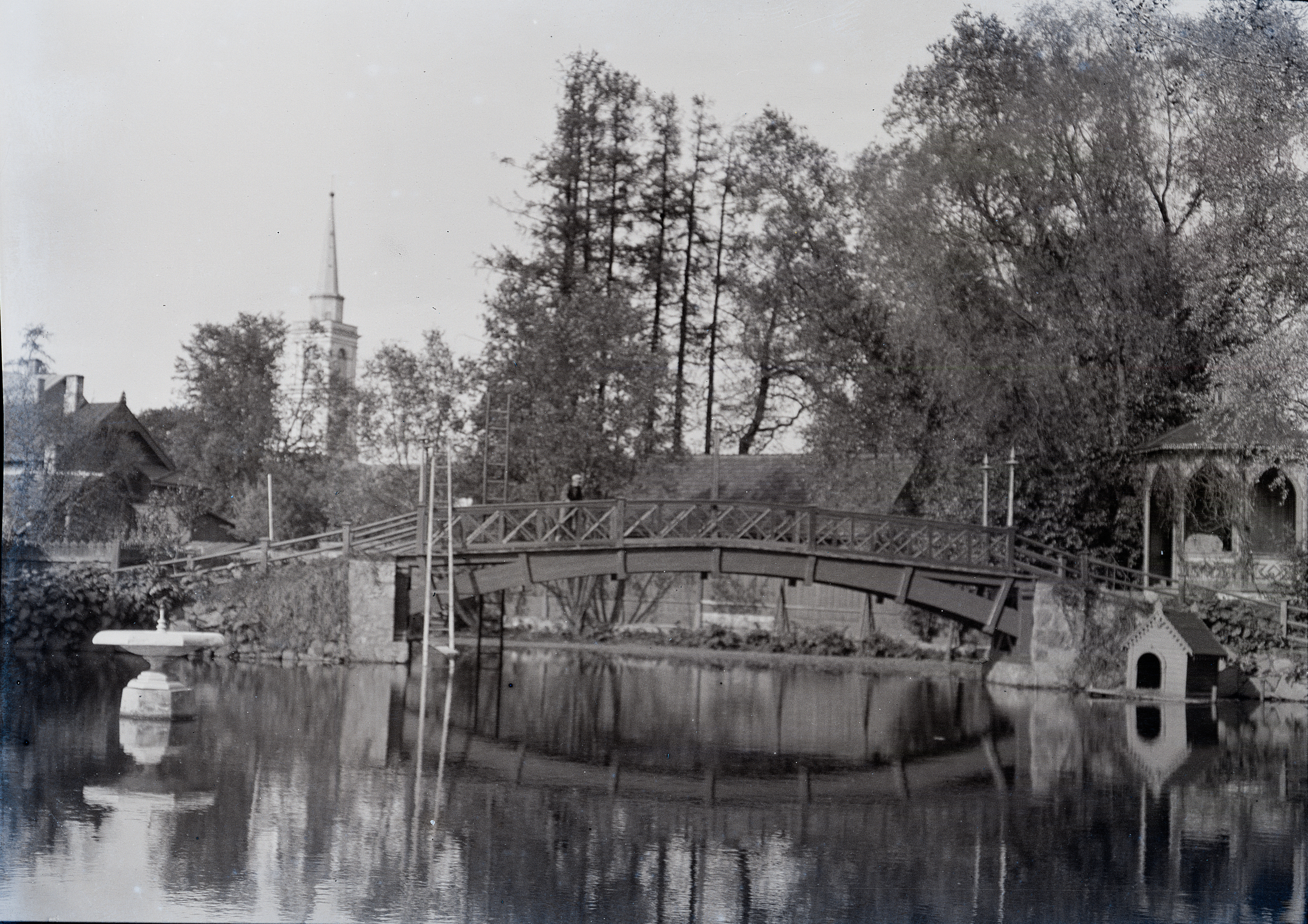 Tartu, Saksa käsitööliste seltsi aed. Tiik ja sild